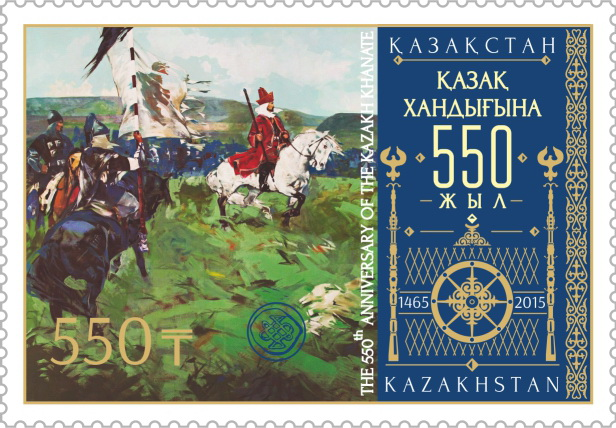 Anniversaire des 550 ans du Khanat kazakh